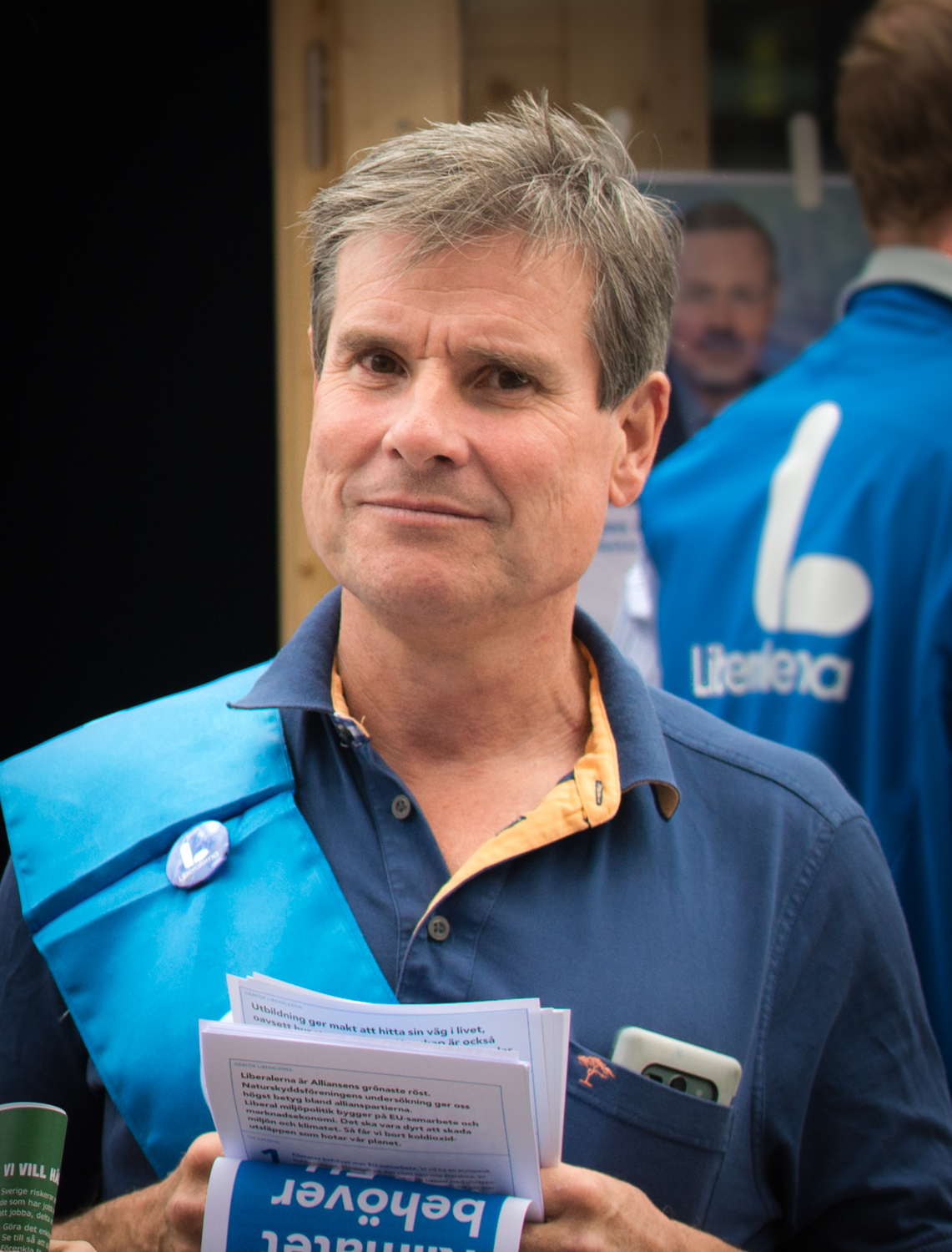 Björn Ljung på Soltorget vid Sergels torg i Stockholm under valrörelsen 2018.